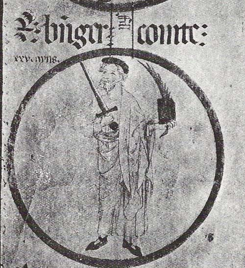 Rotlle genealògic del Monestir de Poblet